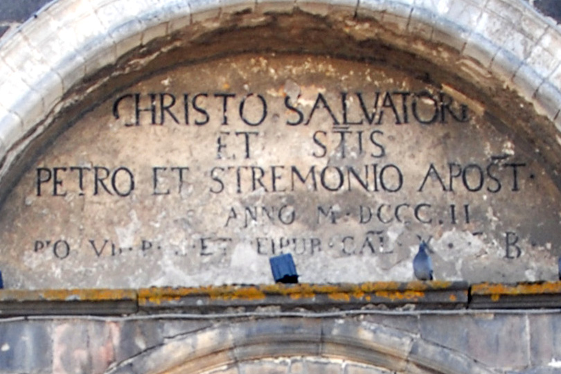 Mozat, Bogenfeld über Hauptportal